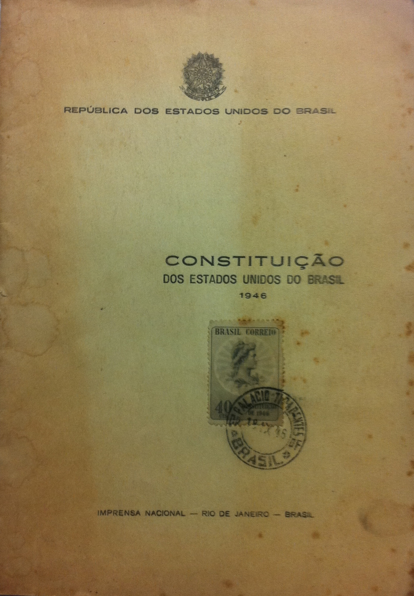 Exemplar original com o texto da Constituição de 1946, impressa pela Imprensa Nacional. com carimbo e selo filatélico e homenagem à promulgação da mesma no Palácio Tiradentes, no dia 18 de setembro de 1946.